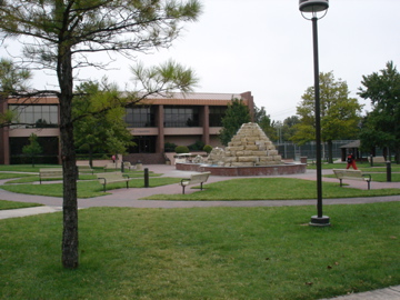 SNU Centennial Plaza